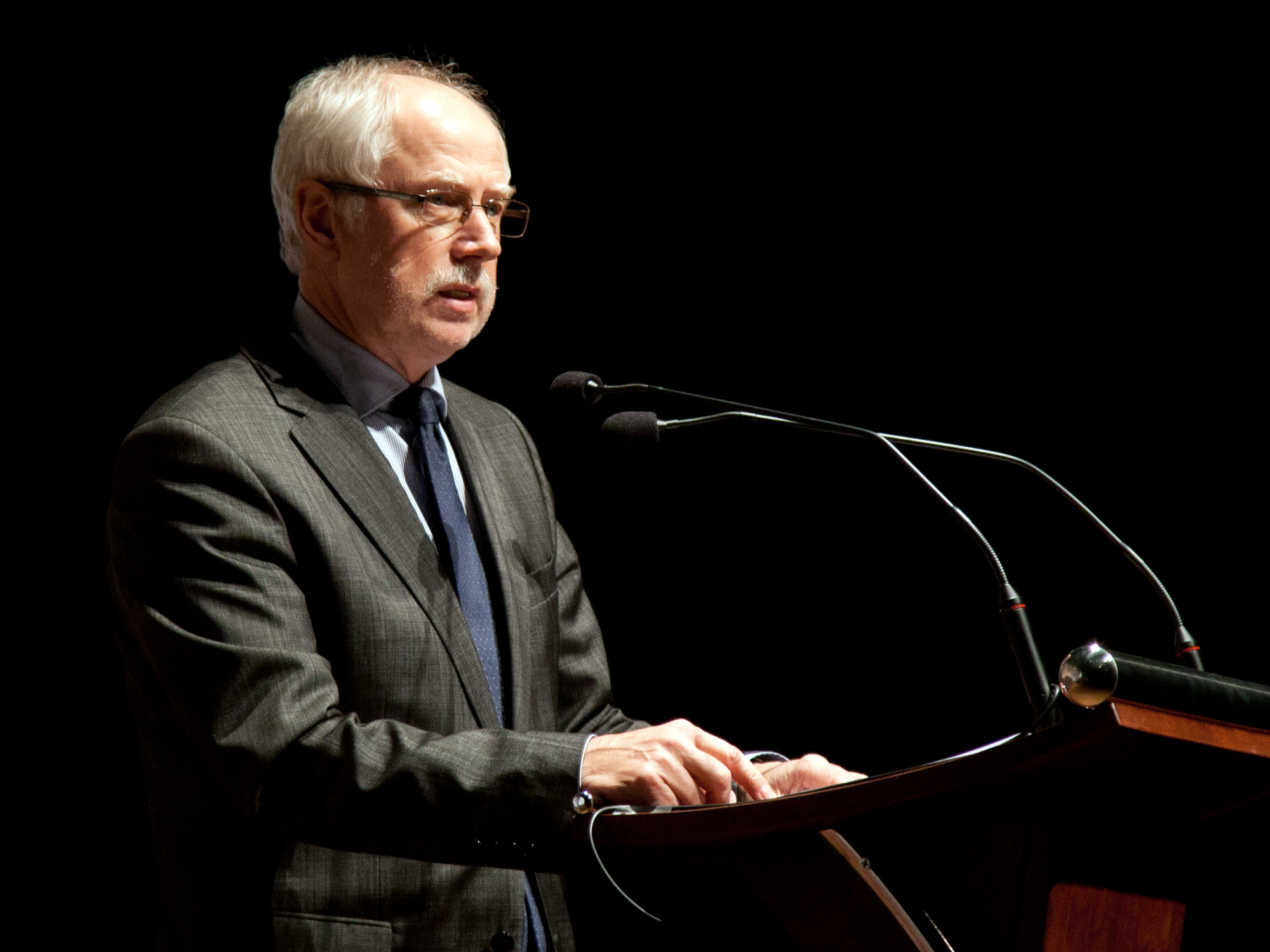 Polski ekonomista, polityk, w latach 2004–2005 minister skarbu państwa w pierwszym i drugim rządzie Marka Belki.